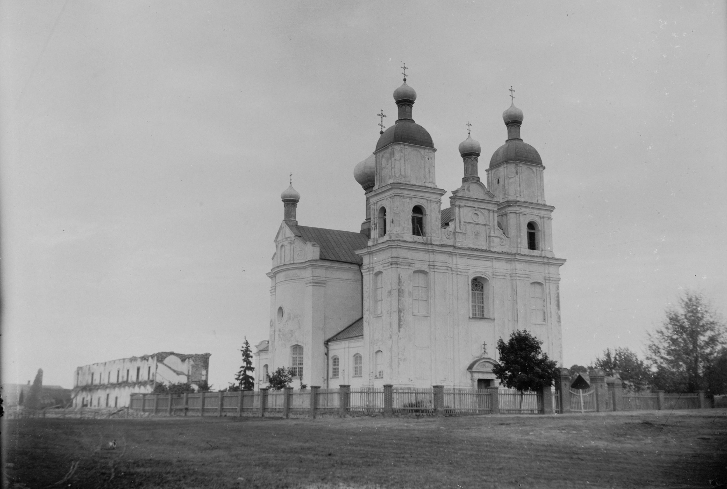 Беларуская (тарашкевіца): Дунілавічы (Duniłavičy), пляц Рынак (plac Rynak). Касьцёл Найсьвяцейшай Тройцы пры кляштары дамініканаў па маскоўскай перабудове